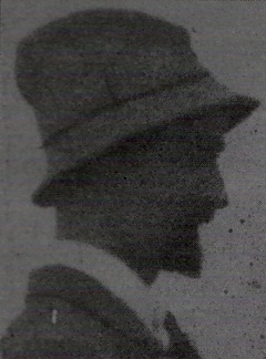 HYAMS, Henry B. (pseŭdonime TAGULO). 1879-1965.